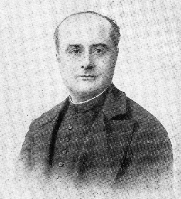 L'abbé Eugène Bossard vers l'âge de 35 ans (vers 1888).